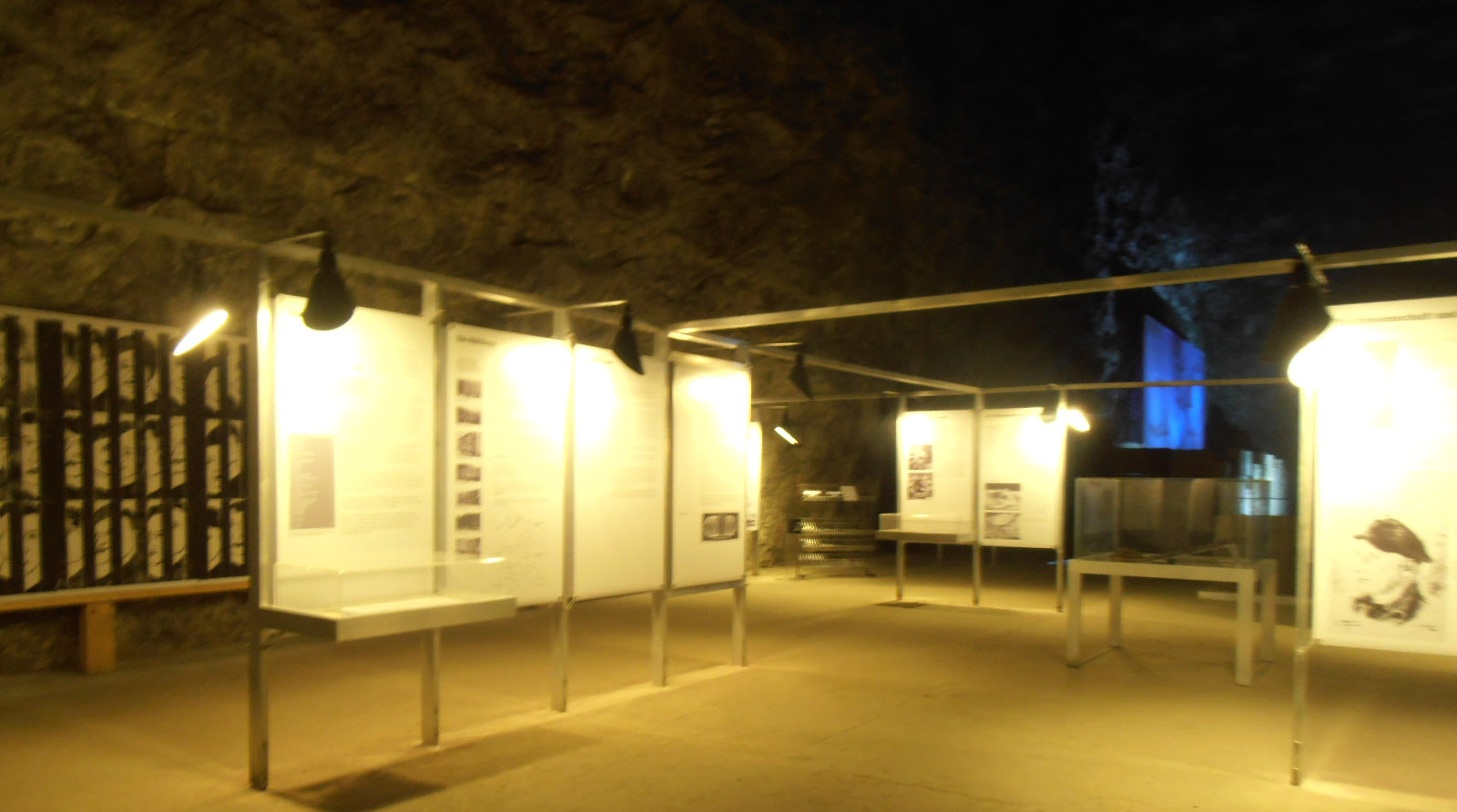 Infoboards in der KZ-Gedächtnisstätte